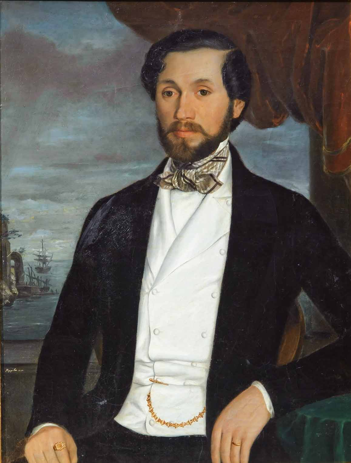 Portretul lui Carol Popp de Szathmari